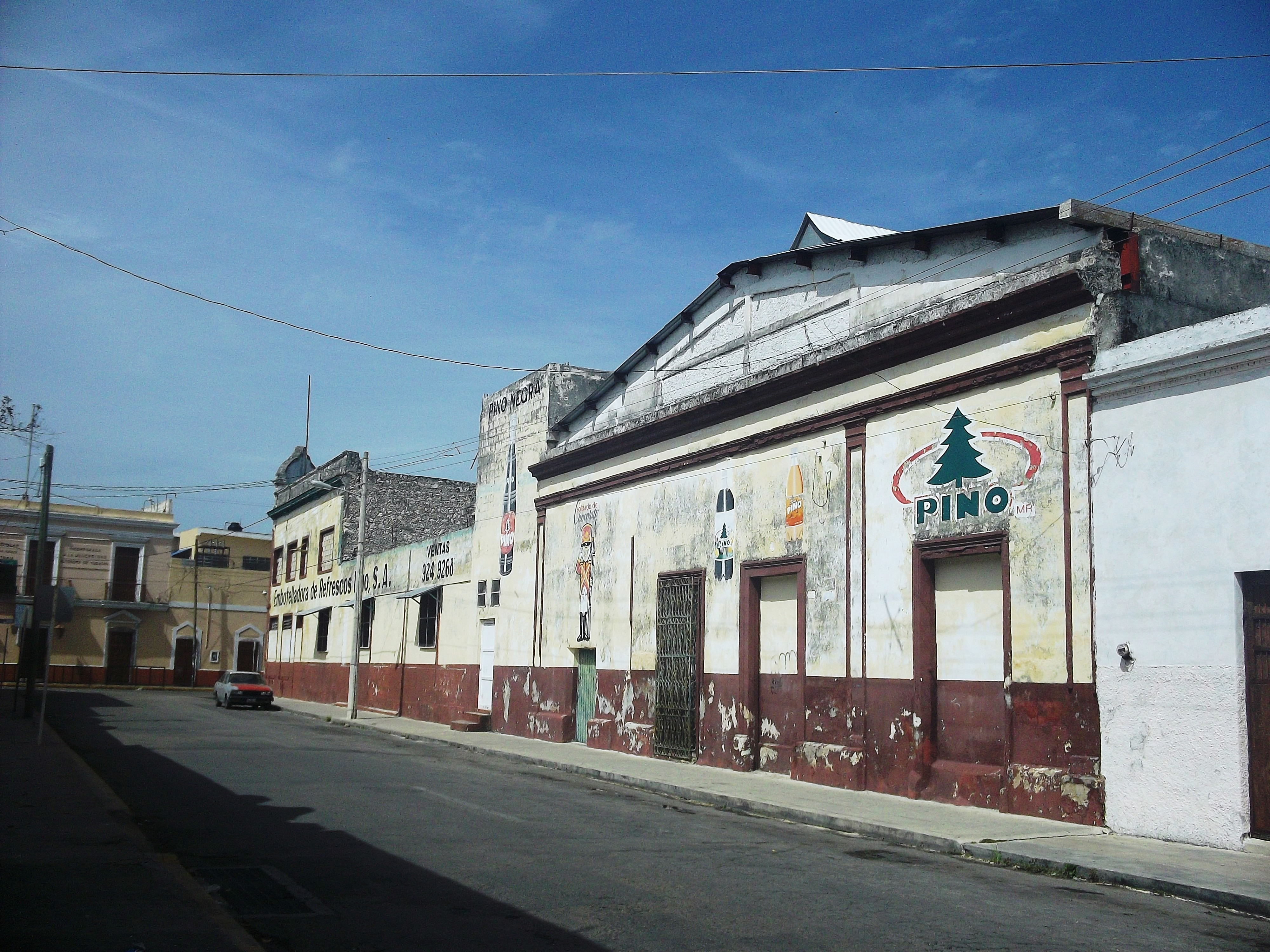 Fábrica de Sidra Pino en Mérida, Yucatán.